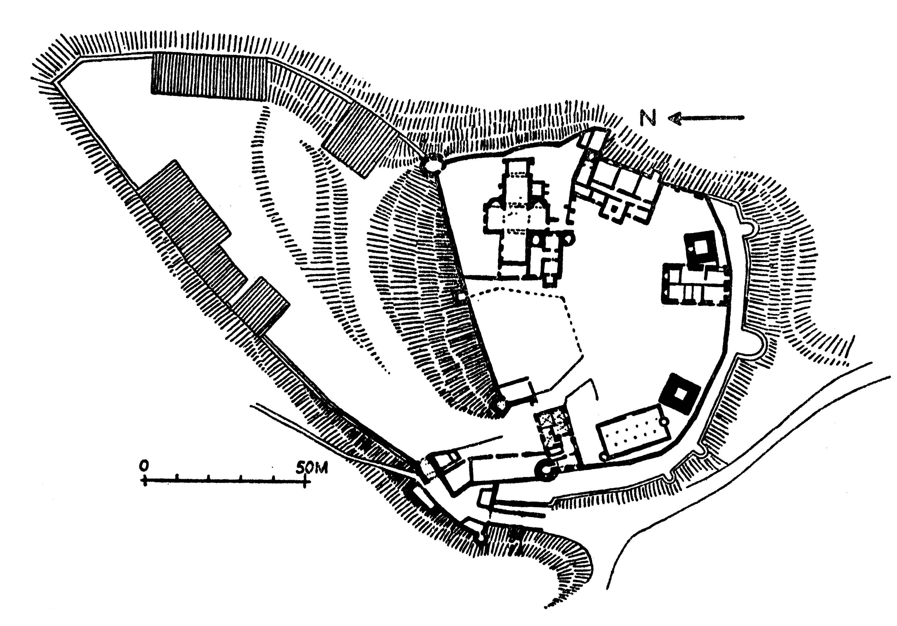 Grundriss Schloss Harburg